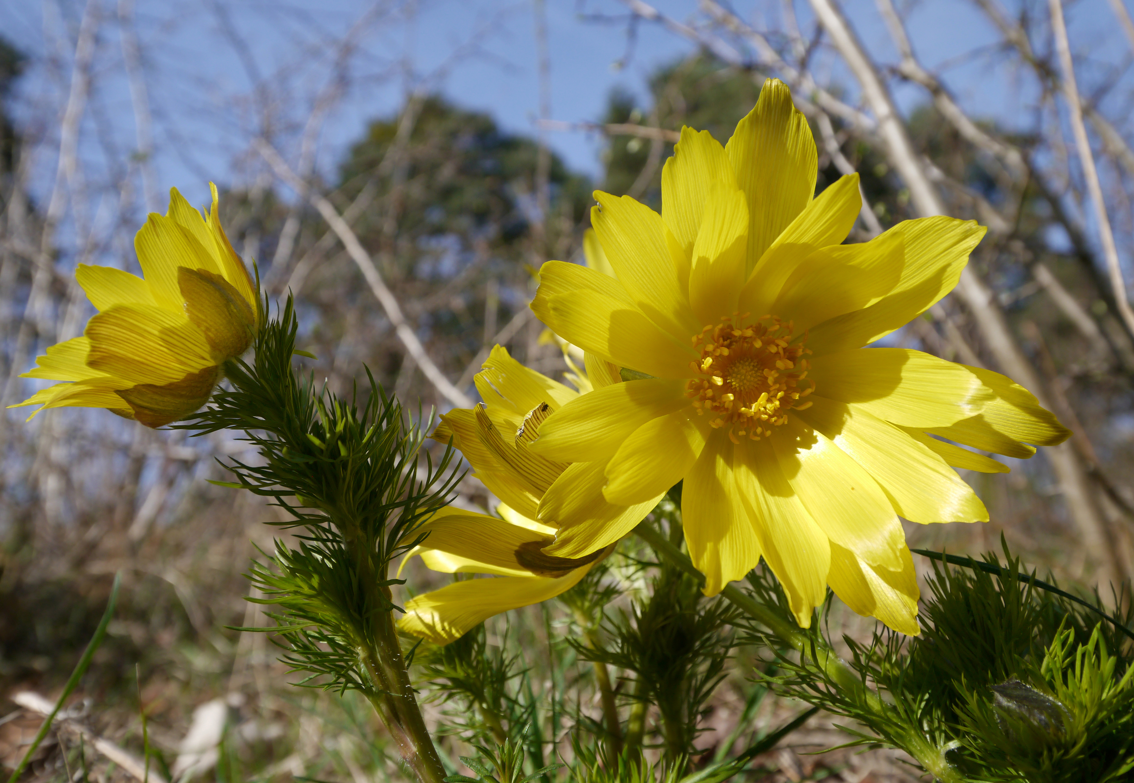 Das stark gefährdete Frühlings-Adonisröschen (Adonis vernalis) im NSG Mainzer Sand